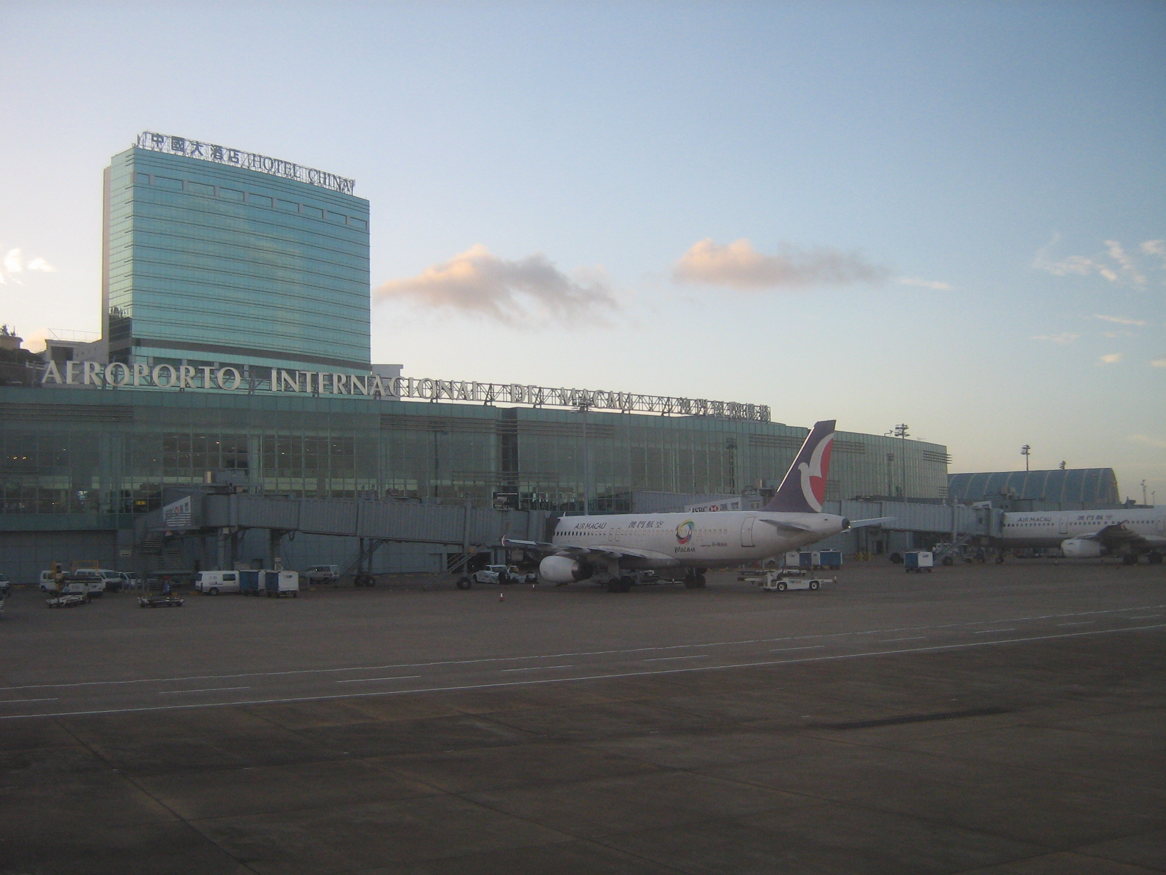 macao airport terminal